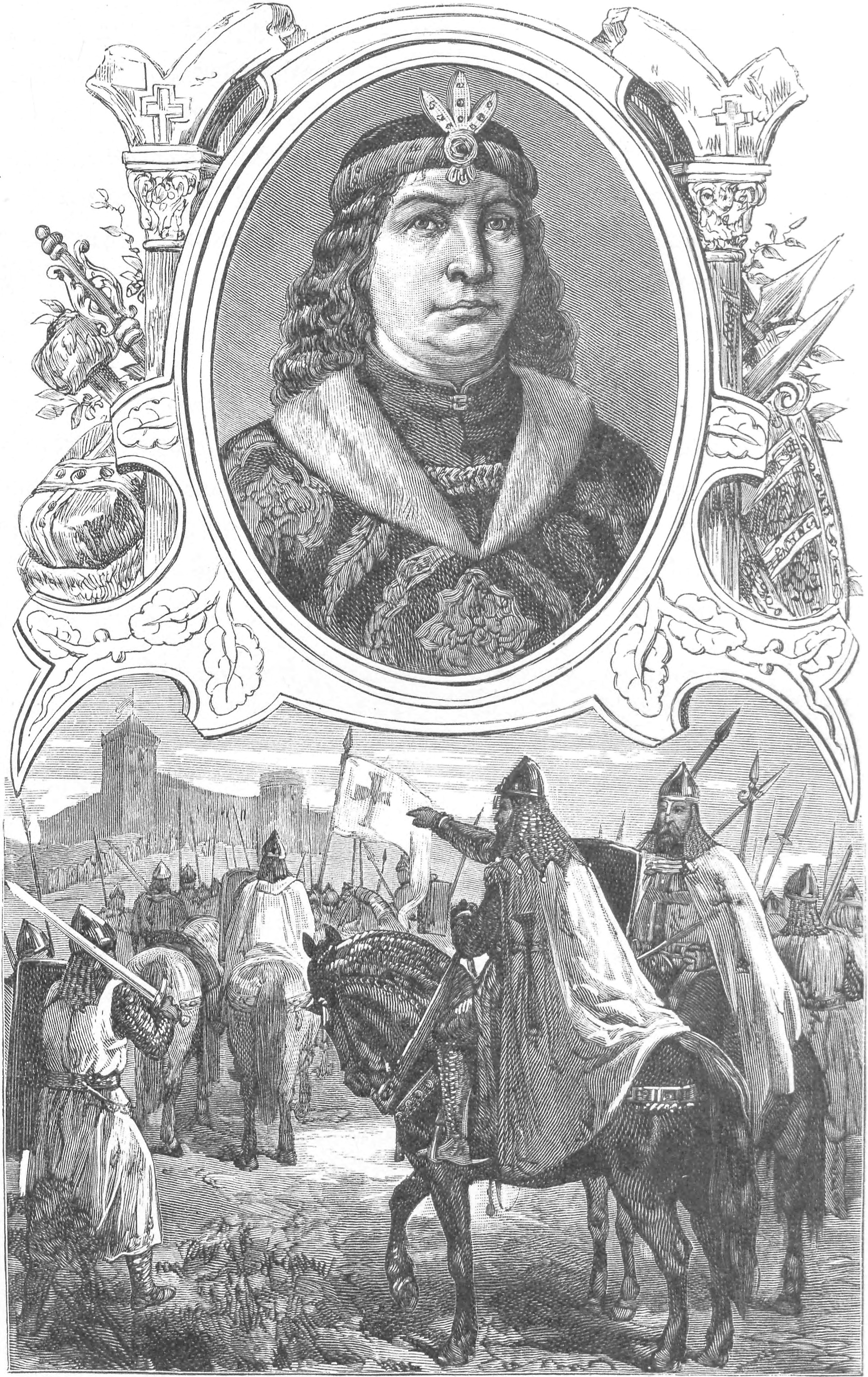 ilustracja z książki „Wizerunki książąt i królów polskich“